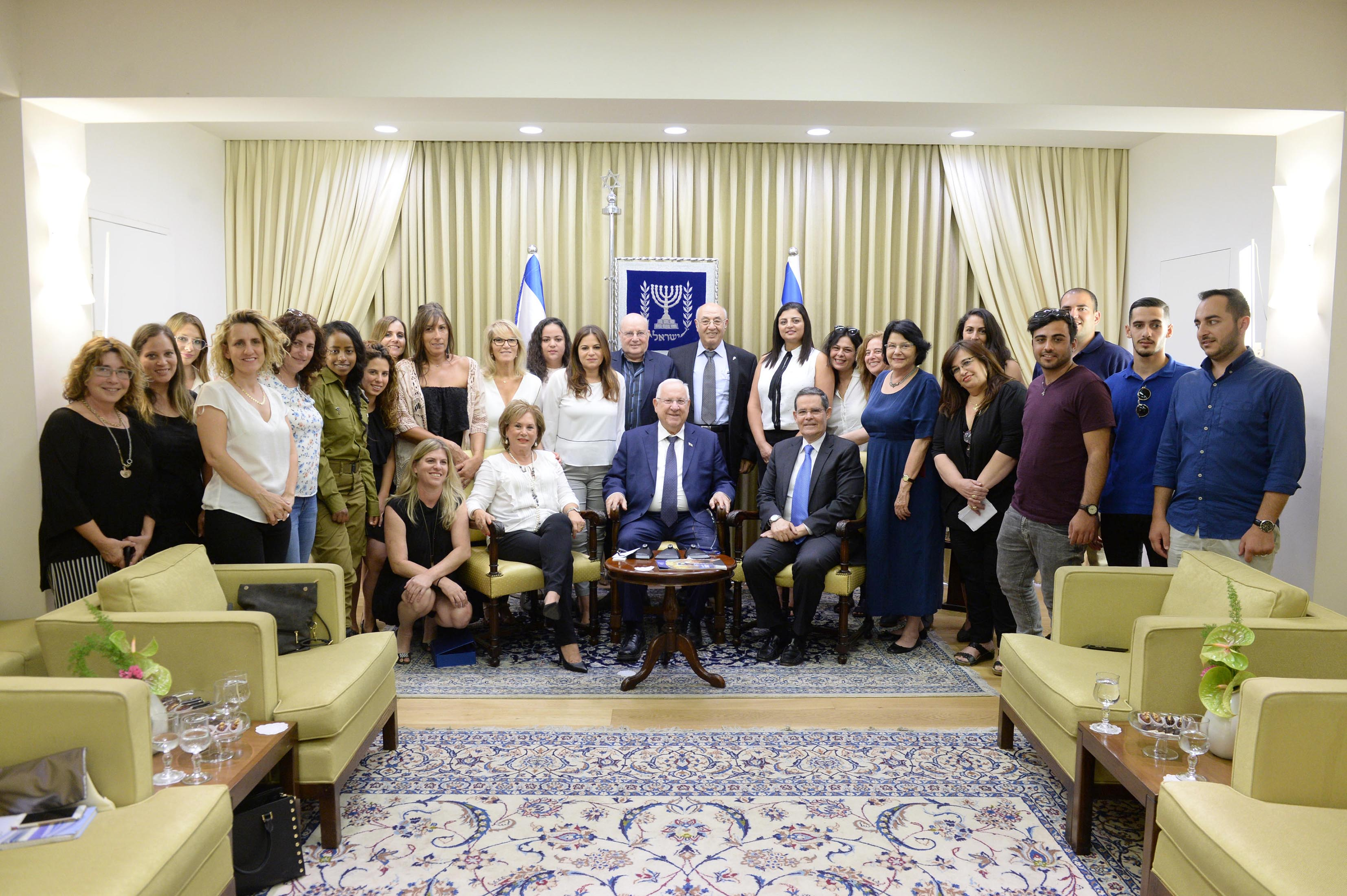 ראובן ריבלין נשיא מדינת ישראל מקבל את הדו"ח השנתי של עמותת עלם לשנת 2017. יושבים במרכז מימין לשמאל: שלמה ינאי, ראובן ריבלין ונאוה ברק